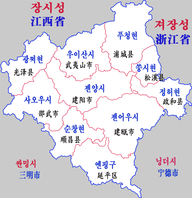 난핑시 현급구역도